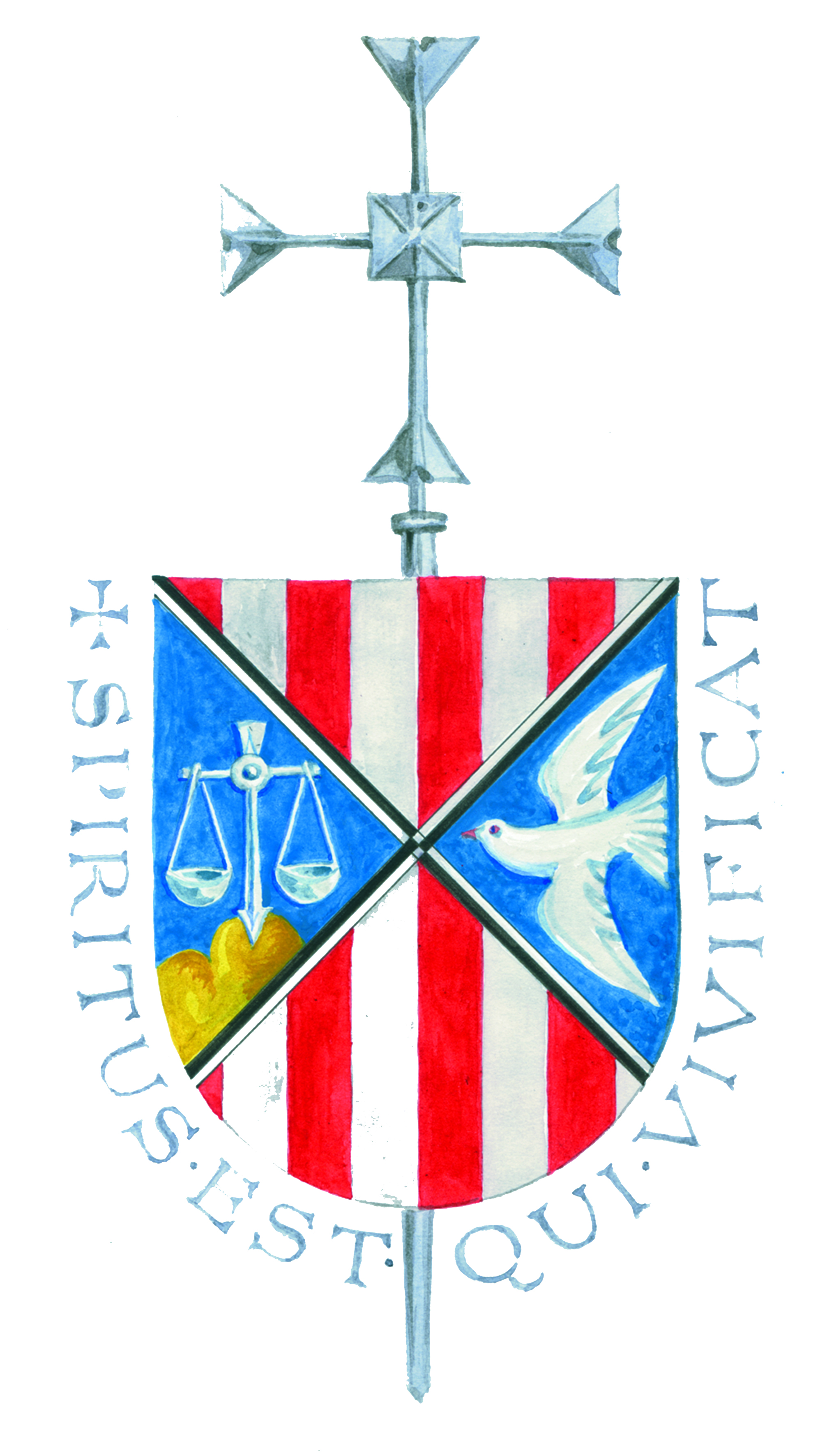 Wappen Weihbischof Losinger